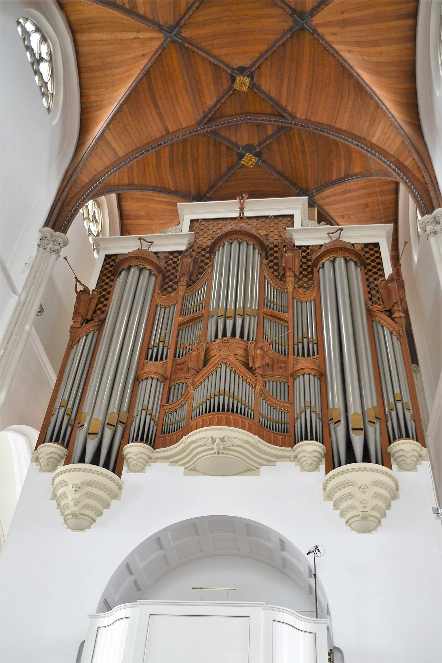 Walcker organ, Martinikerk Doesburg